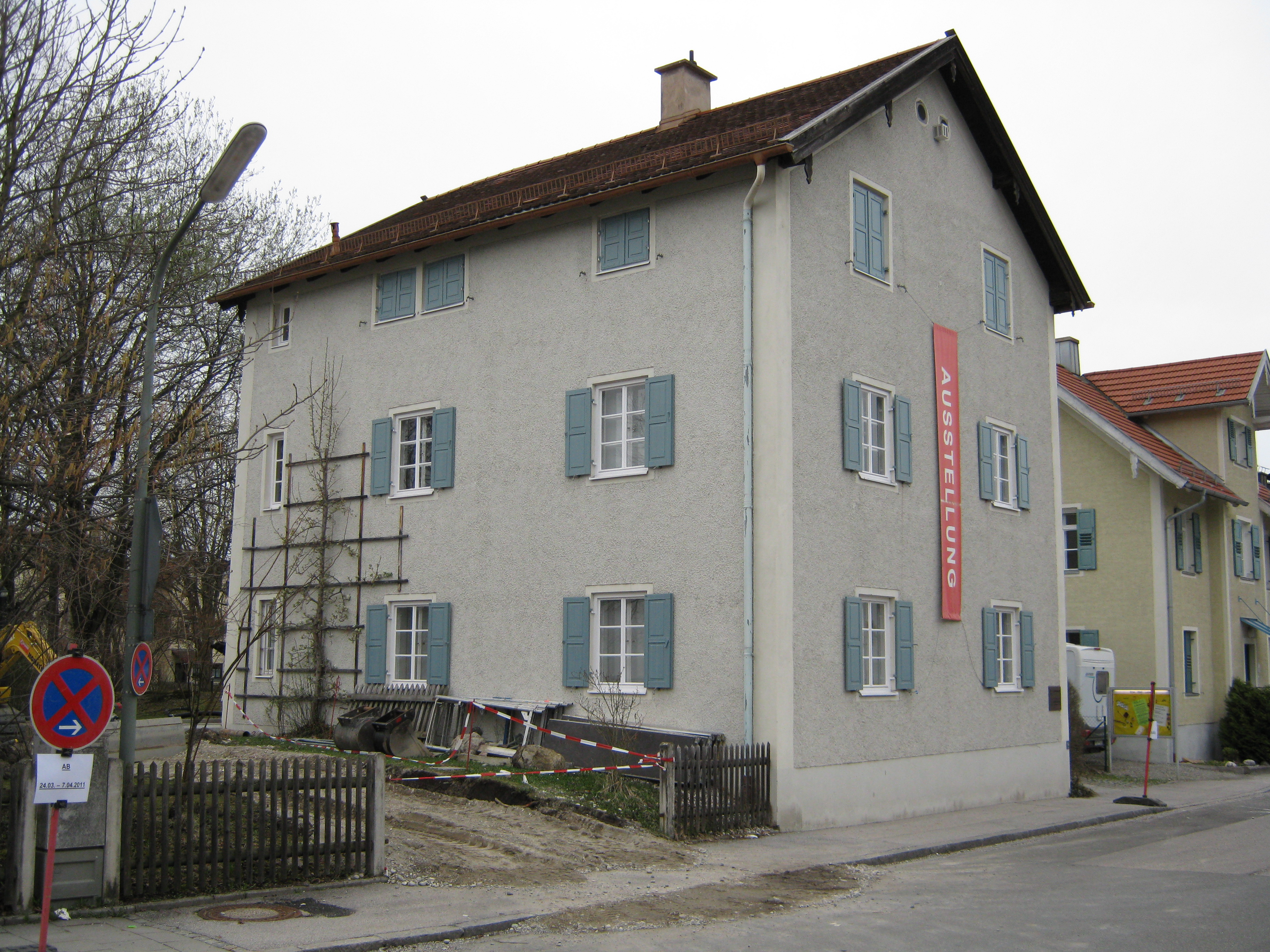 Penzberg - denkmalgeschützte Häuser Bergwerkshaus der Oberkohle - heute Stadtmuseum; Standort Karlstraße 61